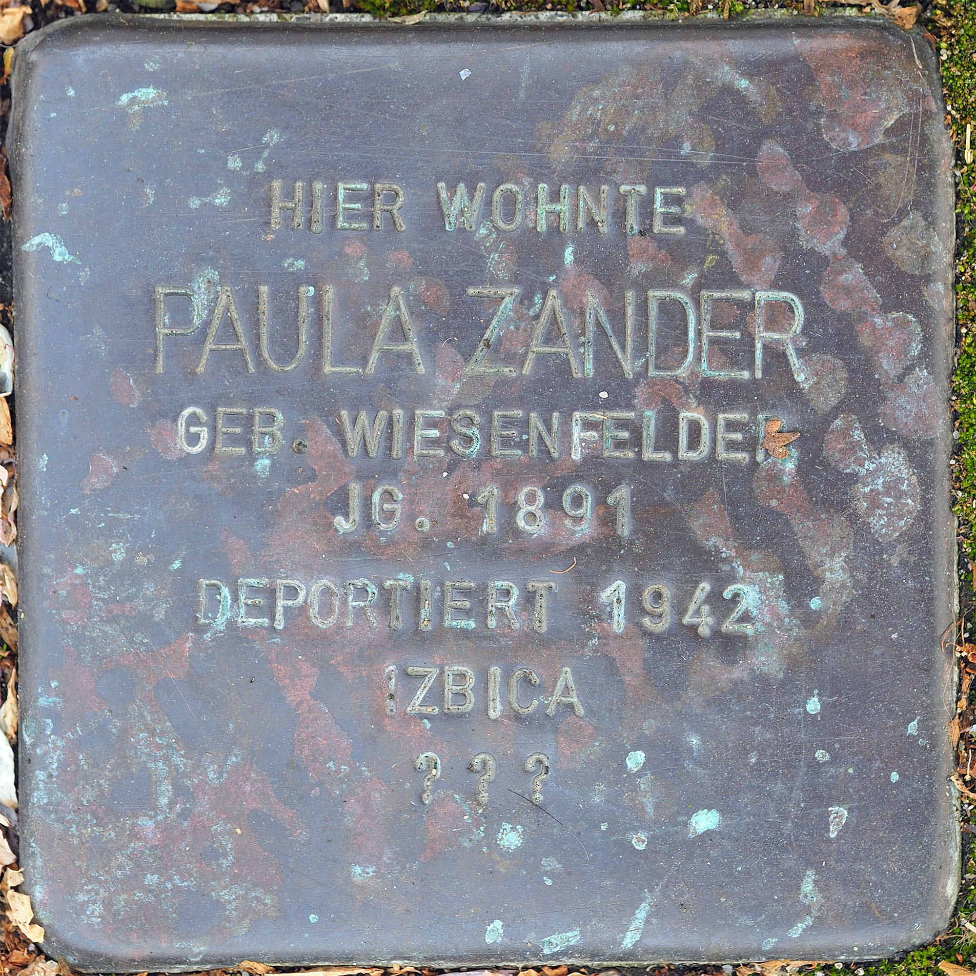 Stolpersteine MG: Zander, Paula